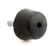 Konischer Gummipuffer der Firma COOP! GmbH